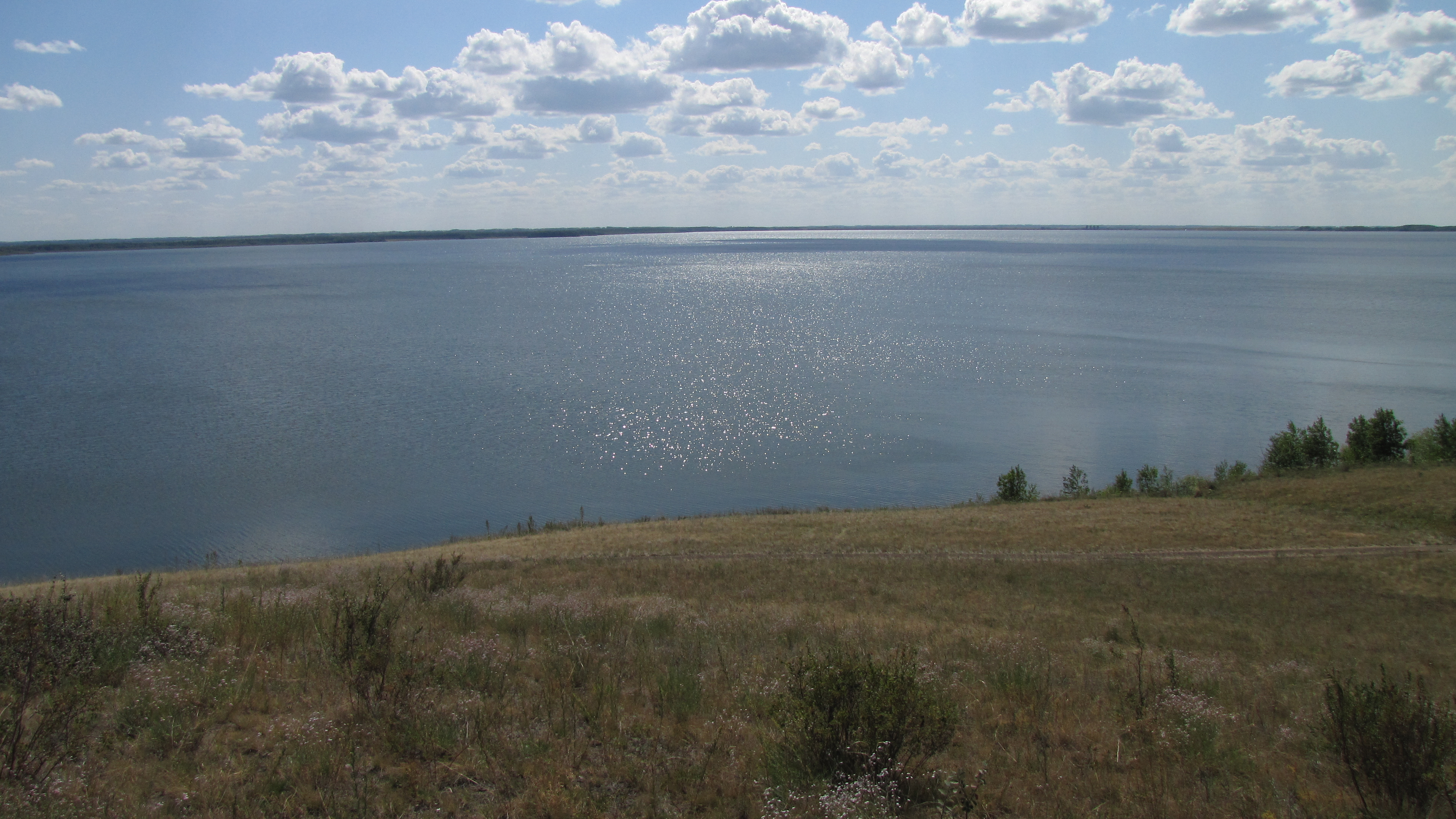 Вид на Гилёвское водохранилище (Алтайский край, Россия)